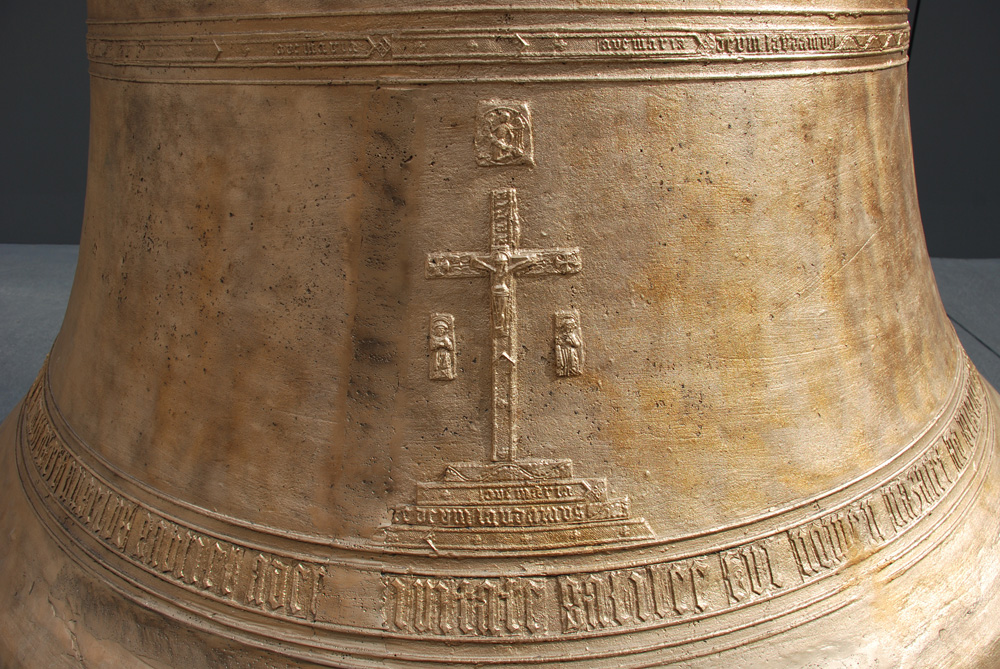 Detalle de la campana Gabriela, catedral de Pamplona.